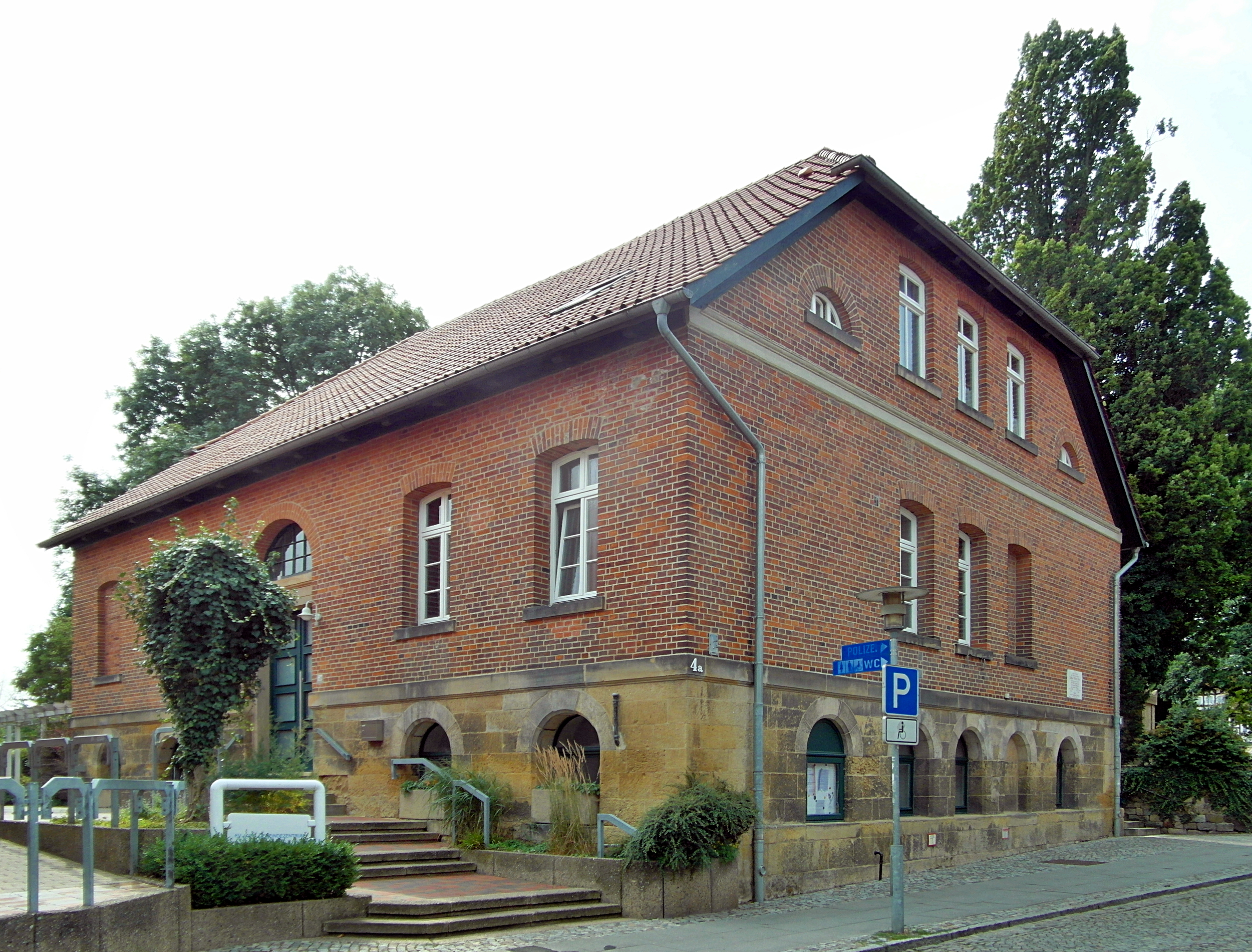 Durch seine Lage und Gestaltung das Stadtbild prägender 2-geschossiger Backsteinbau mit Sandsteinsockel in der Kirchstraße 4a in Gehrden in der Region Hannover